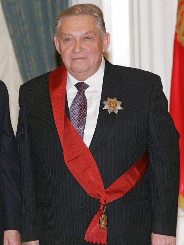 Академик Кутафин